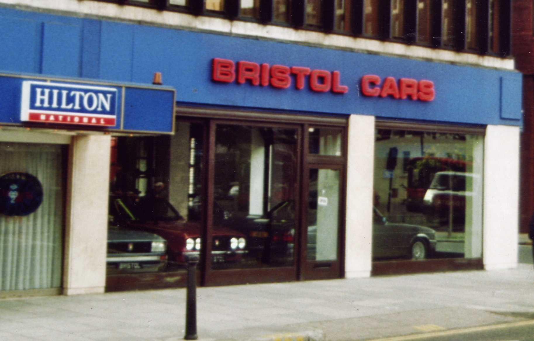 Verkaufsraum der Bristol Cars Ltd. in London, Kensington High Street